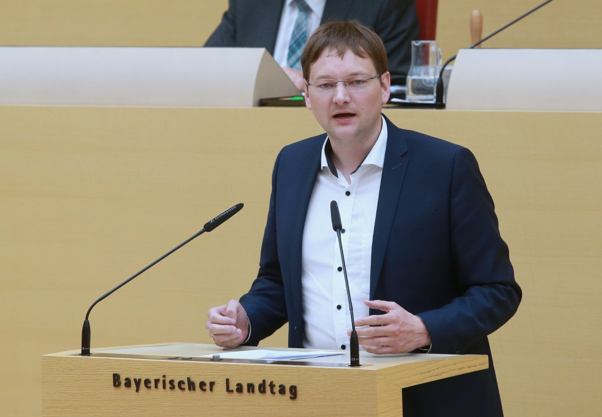 Dr. Hans Georg Reichhart, deutscher Politiker (CSU). Hier am 18. Mai 2017 im Bayerischen Landtag (während der Aktuellen Stunde zum Thema "Der Sicherheit verpflichtet - für eine erfolgreiche Sicherheitspolitik") Titel des Werks: "Hans Reichhart (CSU) am 18.05.2017, Rede im Bayerischen Landtag"